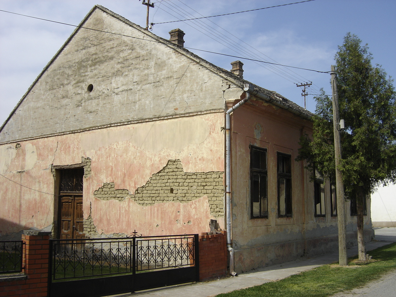 Bolman, parohijski dom